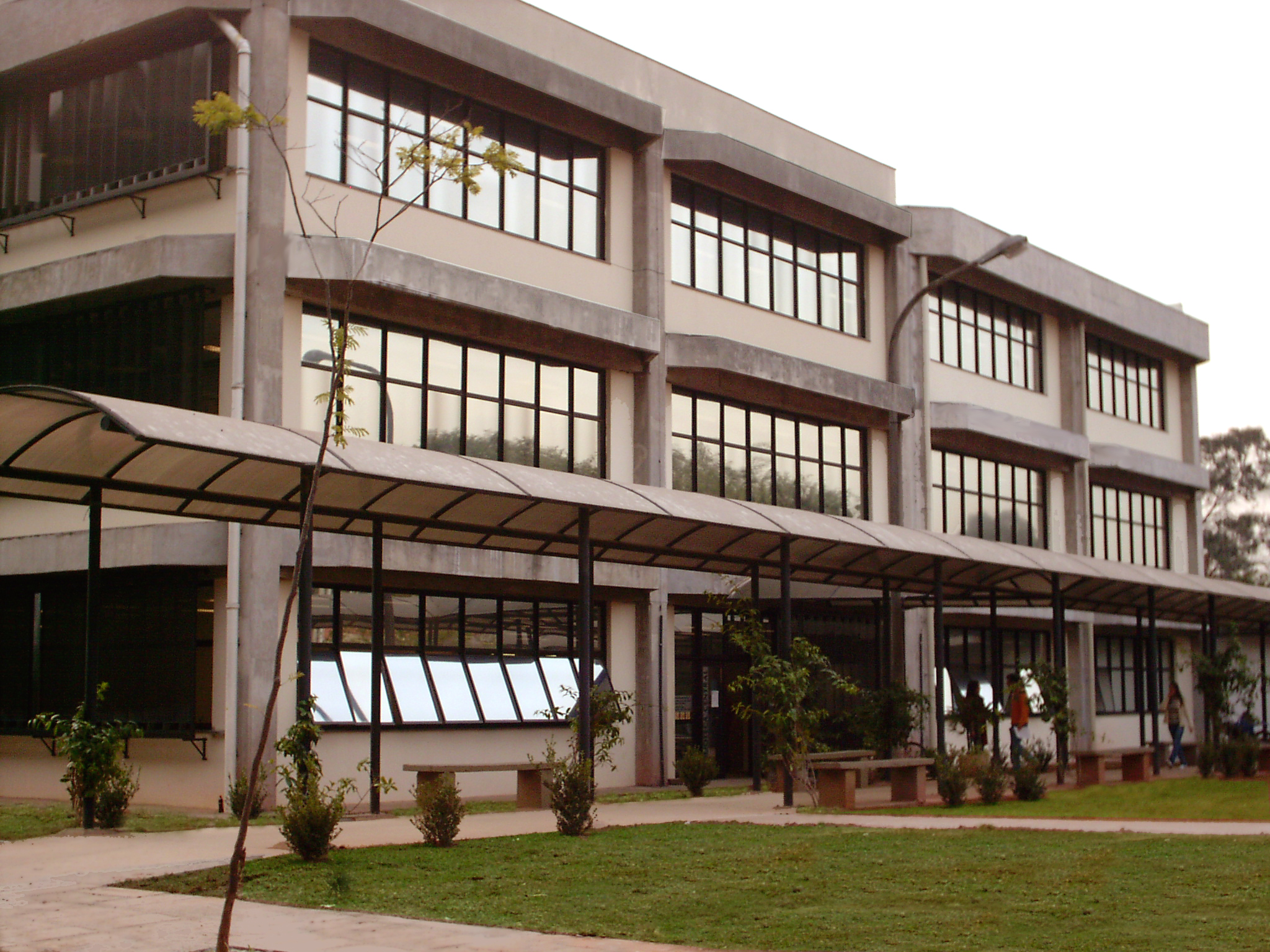 Foto da Biblioteca Florestan Fernandes - frontal, ampliada